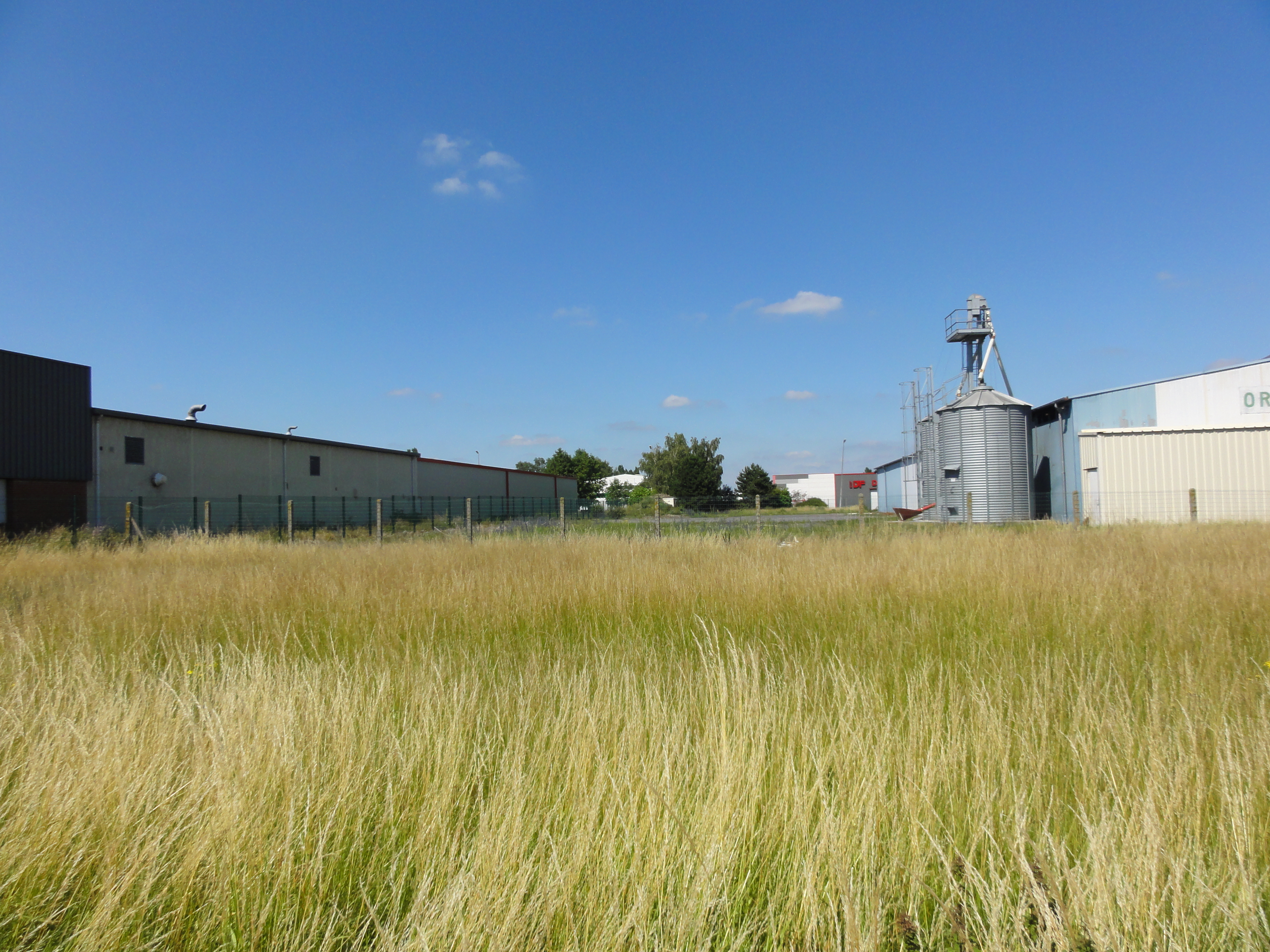 Terril n° 128 dit 7 bis de l'Escarpelle, disparu, Fosse n° 7 - 7 bis de la Compagnie des mines de l'Escarpelle, Courcelles-lès-Lens, Pas-de-Calais, Nord-Pas-de-Calais, France.